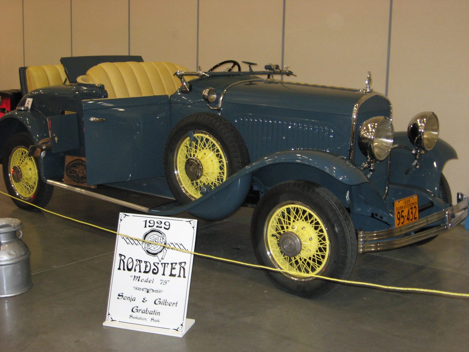 1929 chrysler model 75 roadster